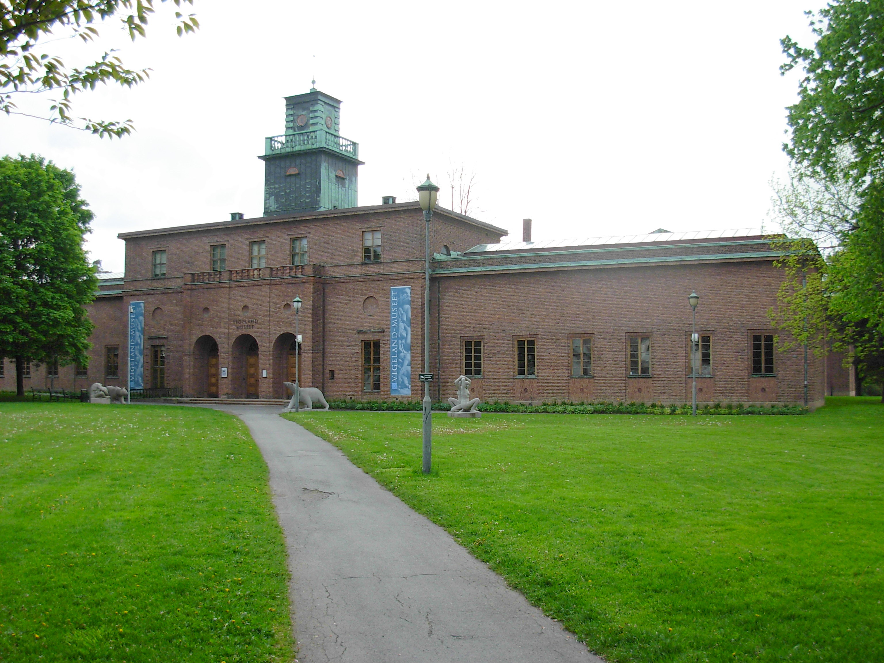 Vigeland museum, Oslo, Norway